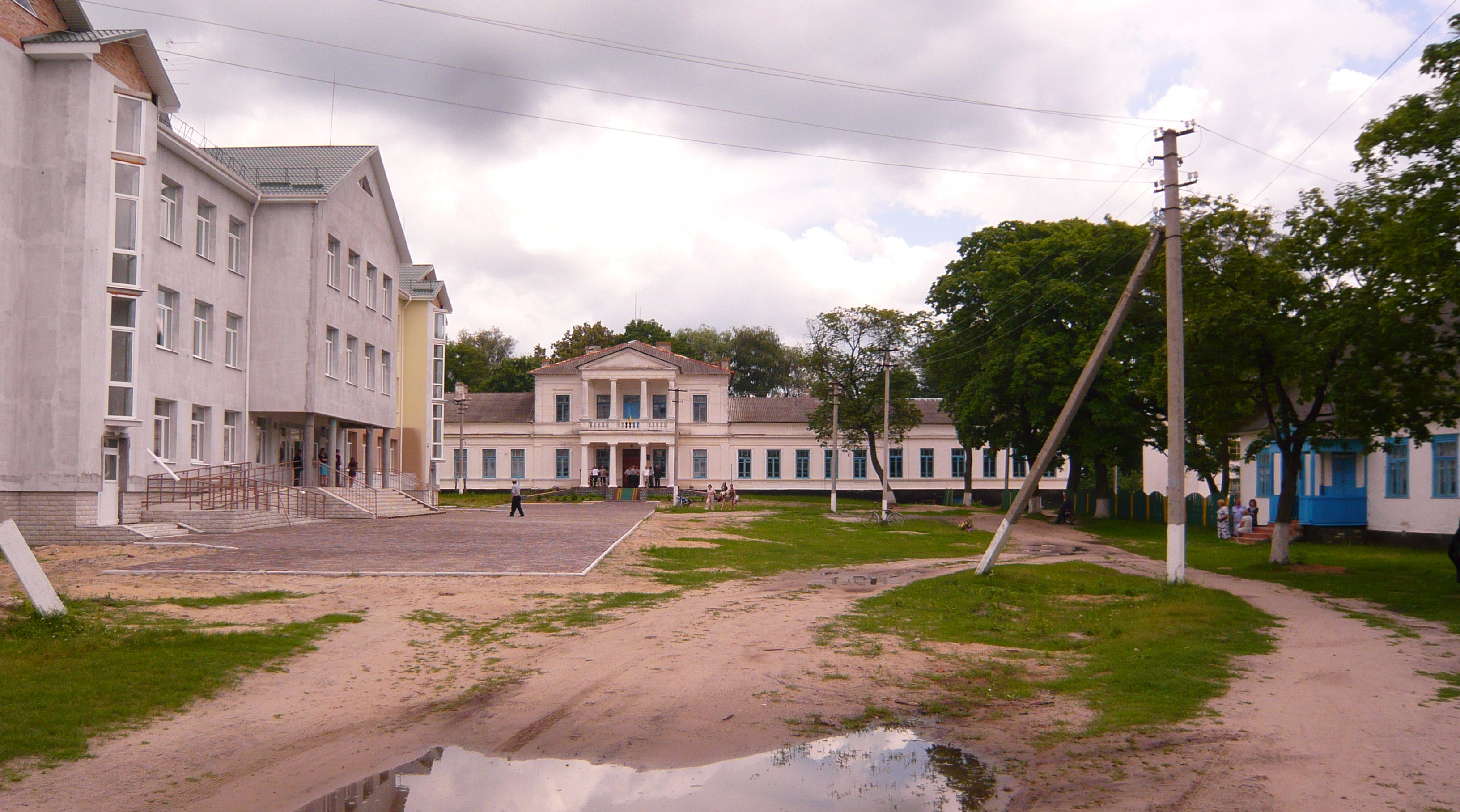 Палац Малинських і будинок нової школи в Тинному